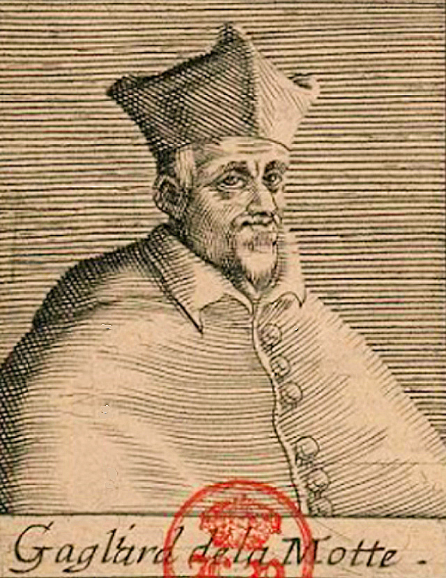 Cardinal Gaillard de La Motte Pressange